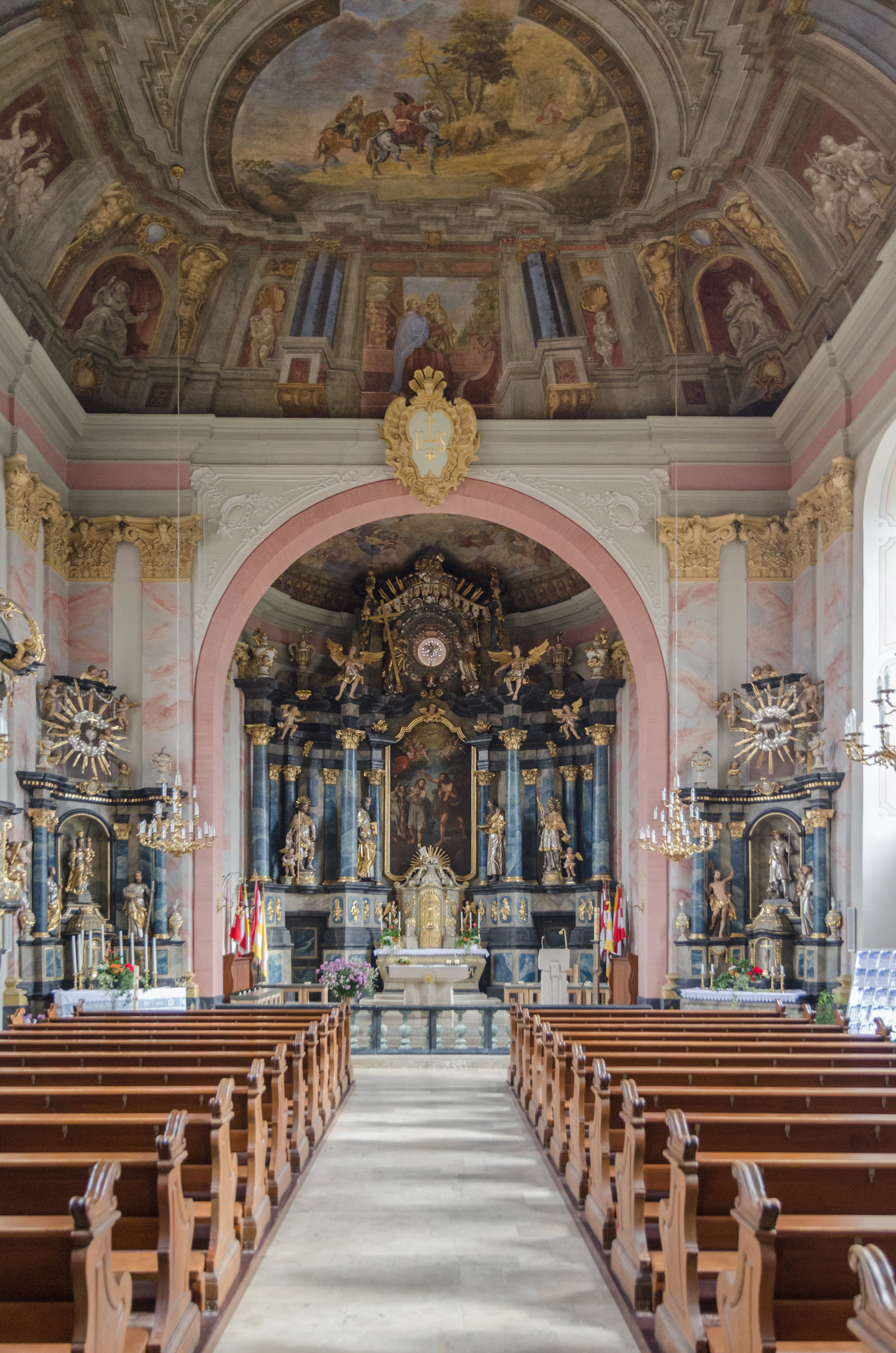 Mönchberg, Katholische Pfarrkirche St. Johann Baptist